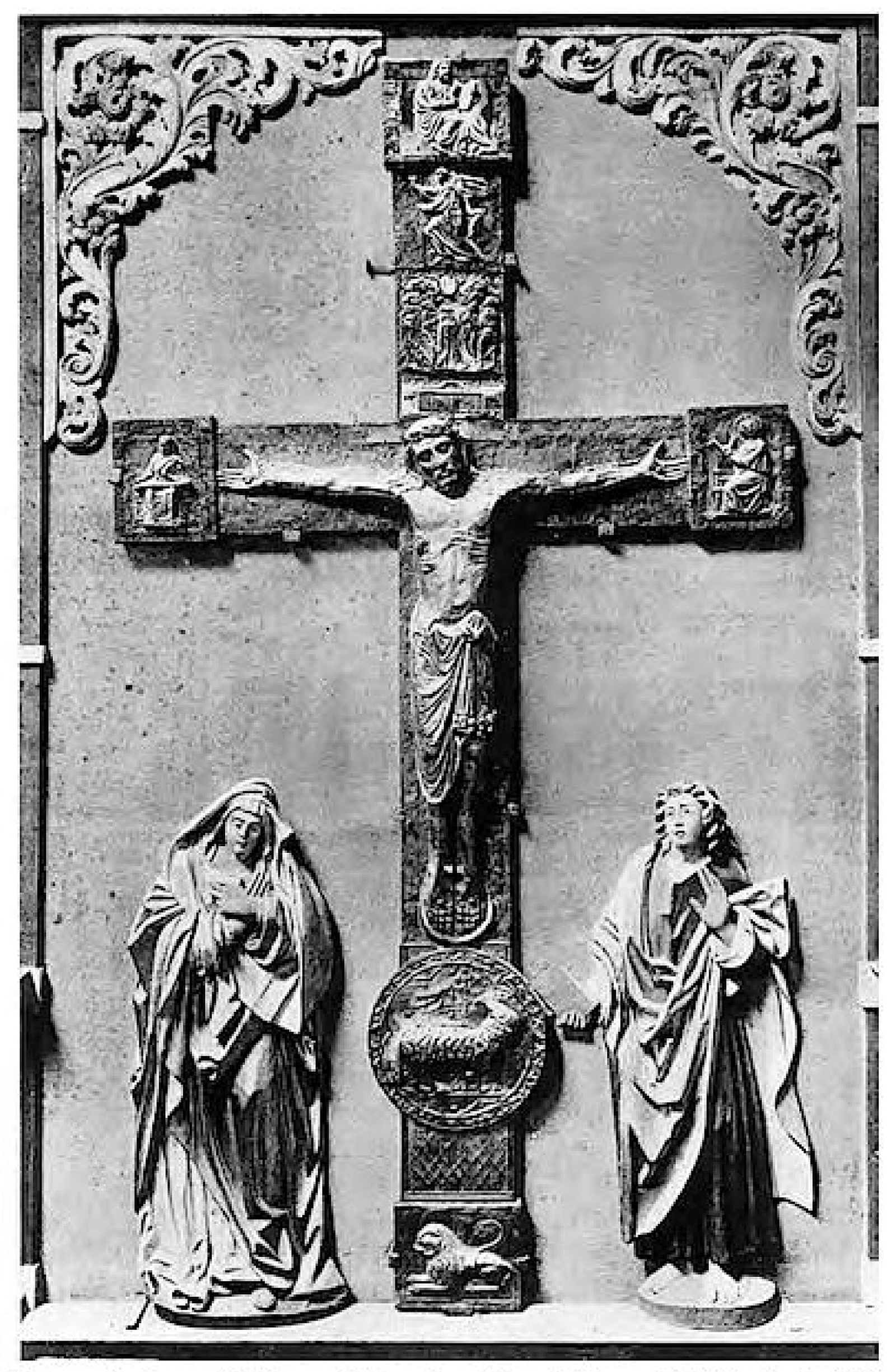 Böcklinskreuz mit der von Wilhelm von Schwndi gestifteten Einfassung